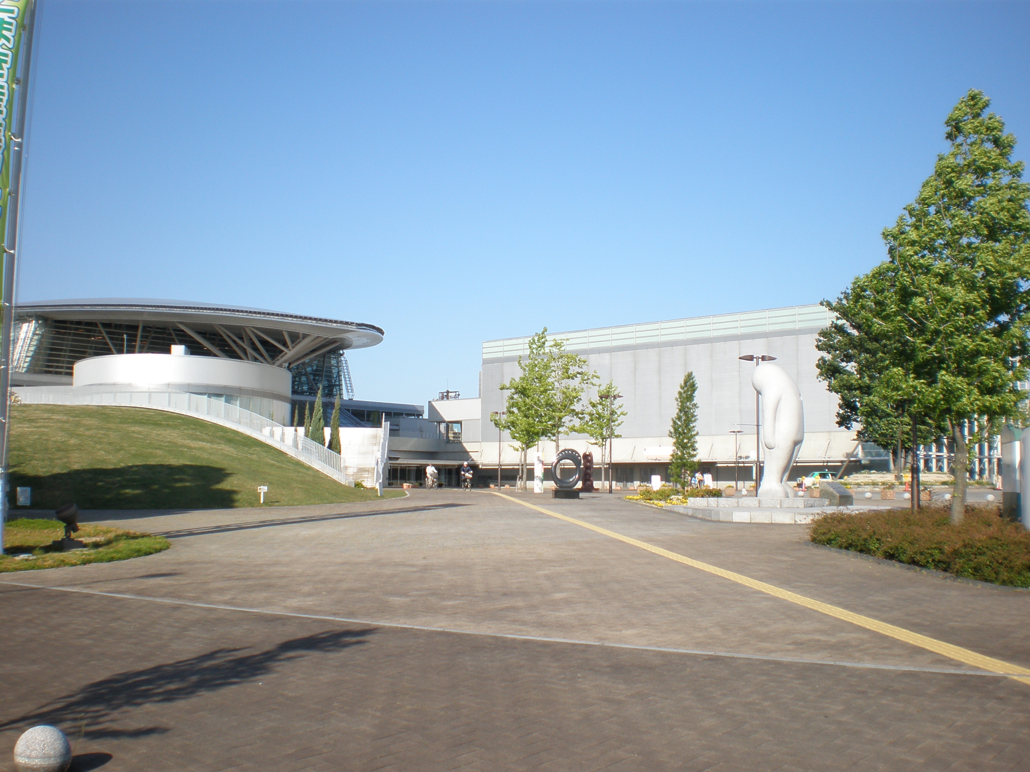 愛知県小牧市の小牧市スポーツ公園にあるパークアリーナ小牧